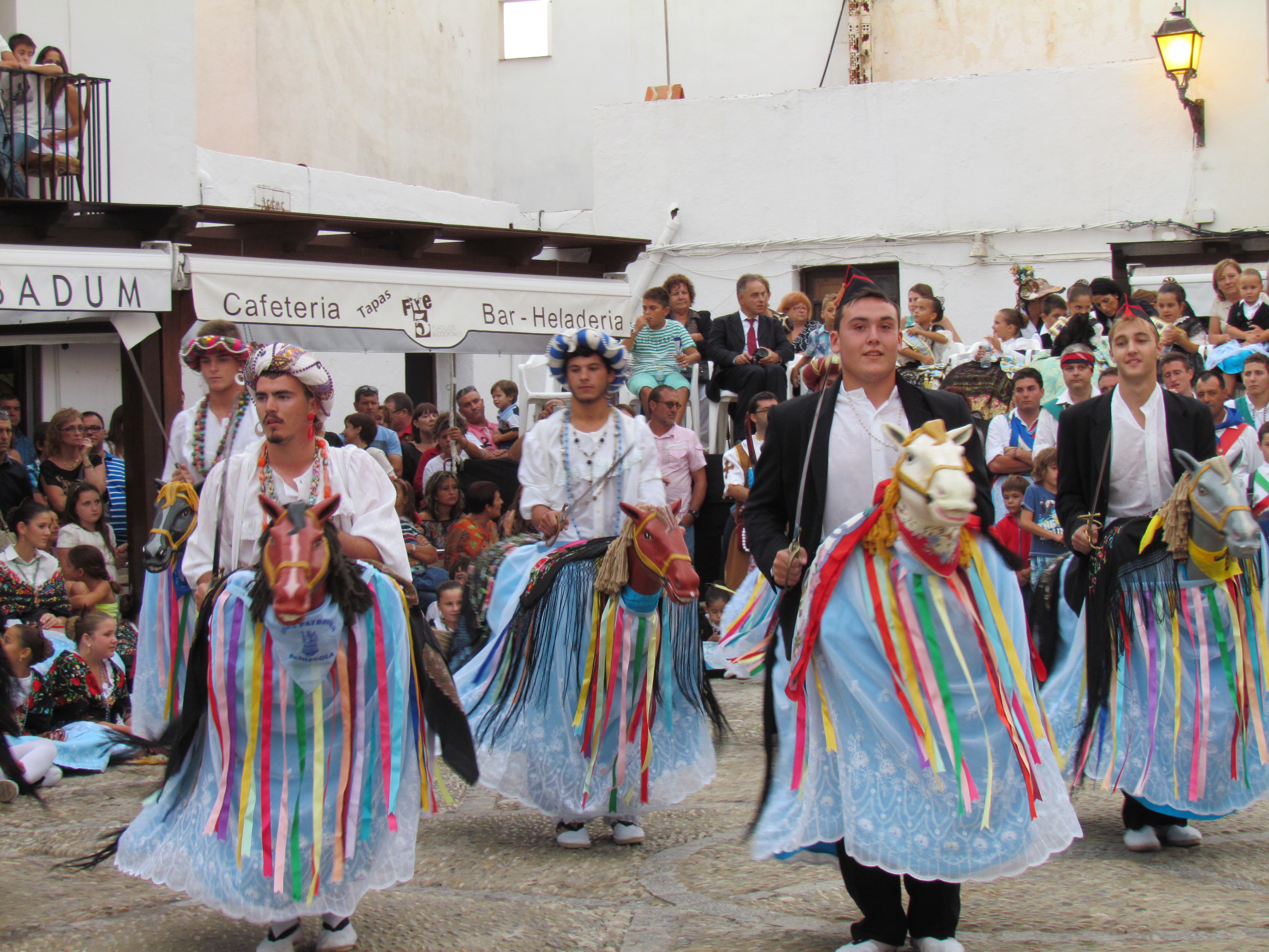 Ball dels cavallets en honor a la Verge de l'Ermitana de Peníscola (Baix Maestrat), en les festes patronals de 2013